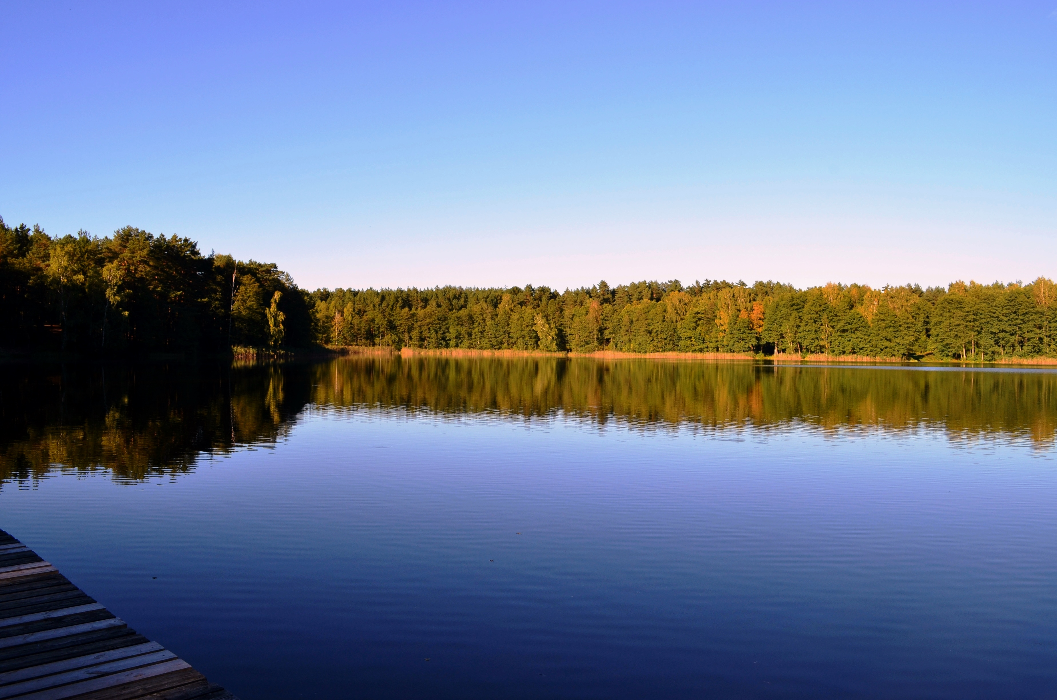 Ežeras Tapelis nuo vakarinio kranto, Vilnius